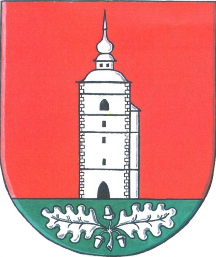 znak, Staré Město, okres Svitavy